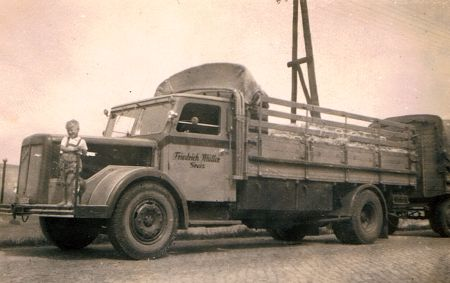 Saurer Pritschen LKW mit Hänger, Typ S4C, Saurerwerke Österreich